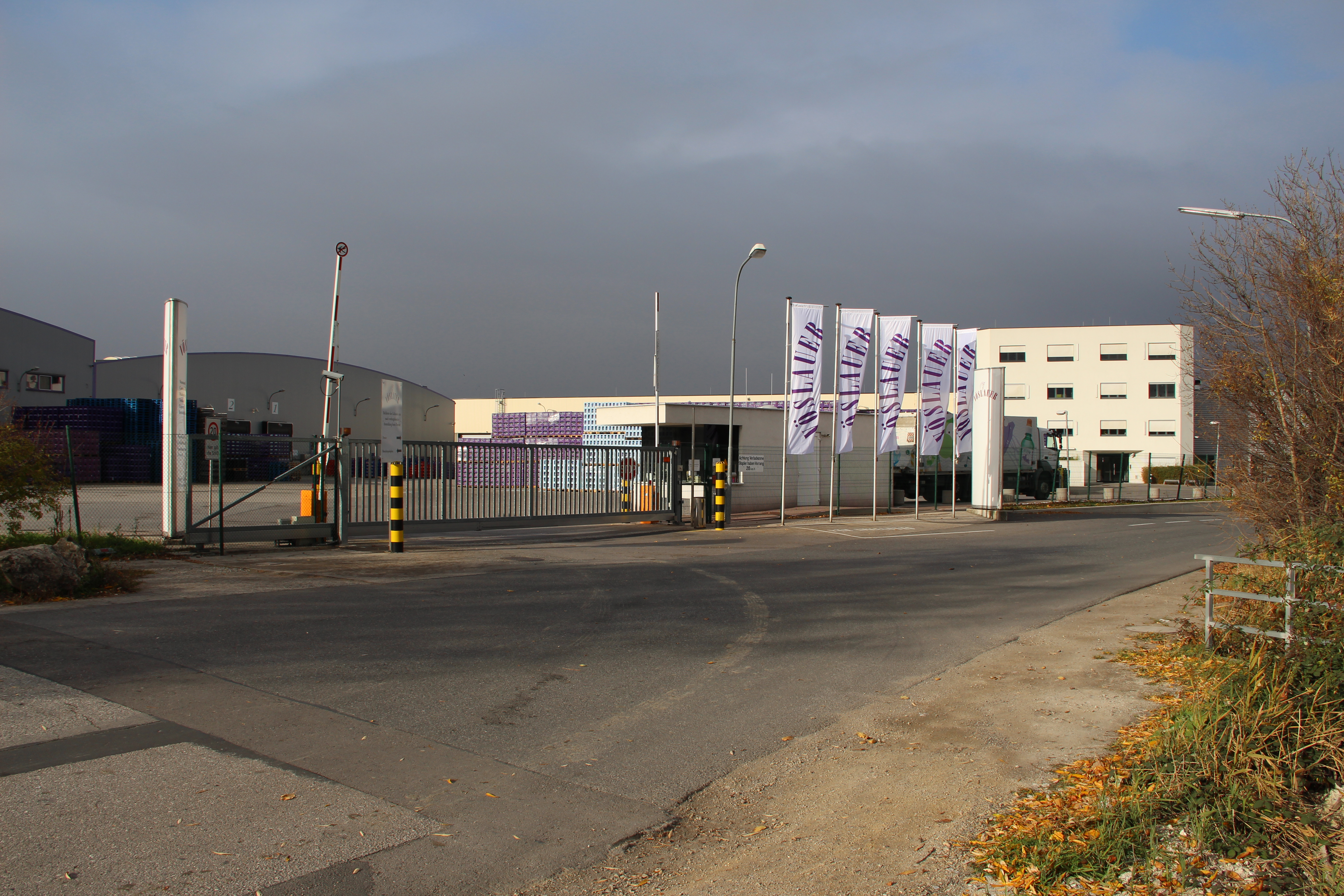 Zentrale der Vöslauer AG in Bad Vöslau, Niederösterreich